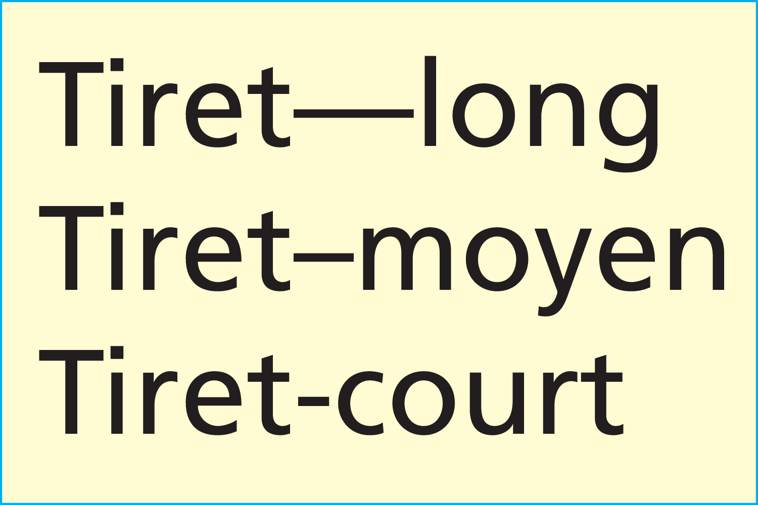 Trois tirets typographiques